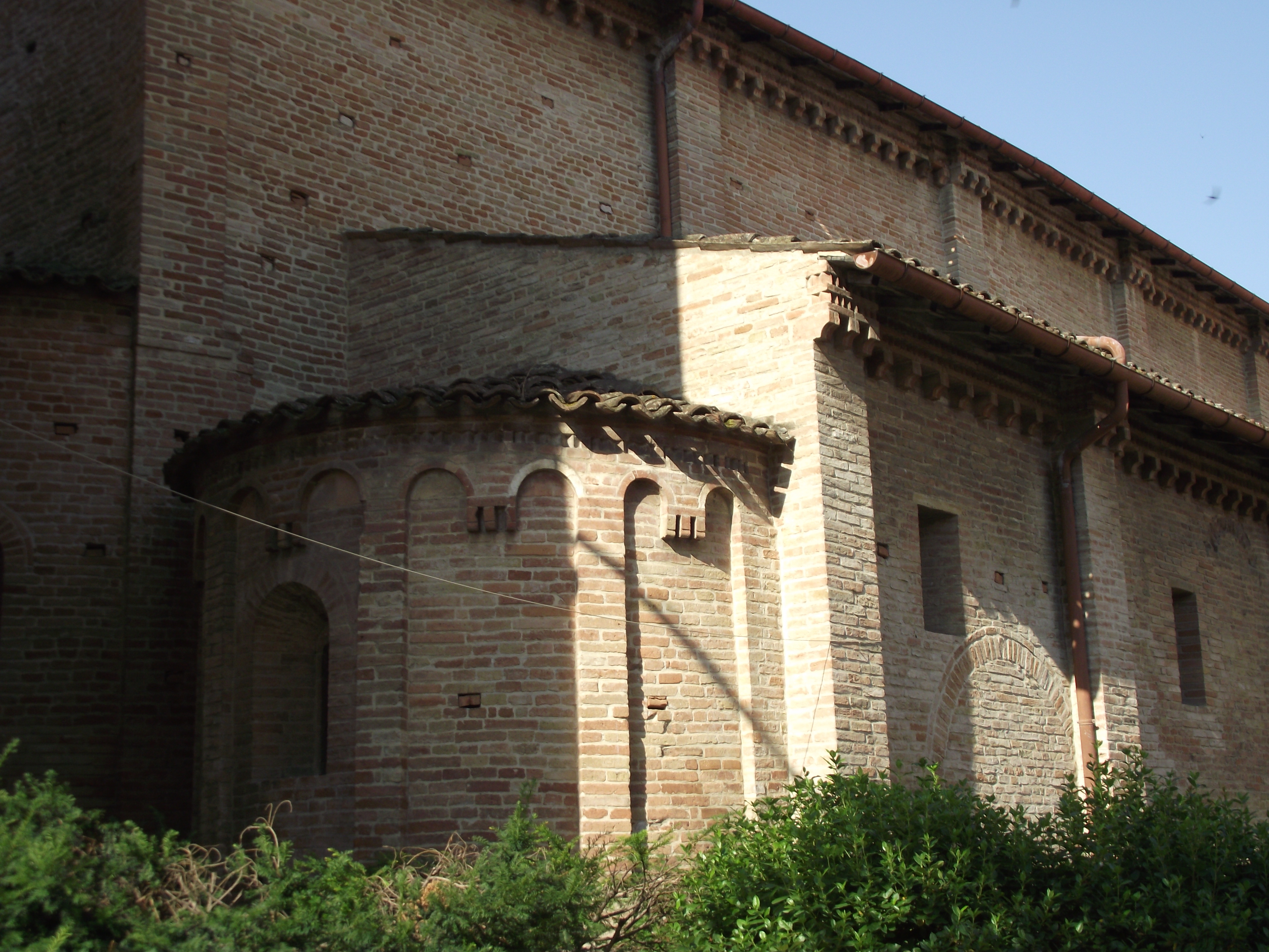 XII-XIII secolo.